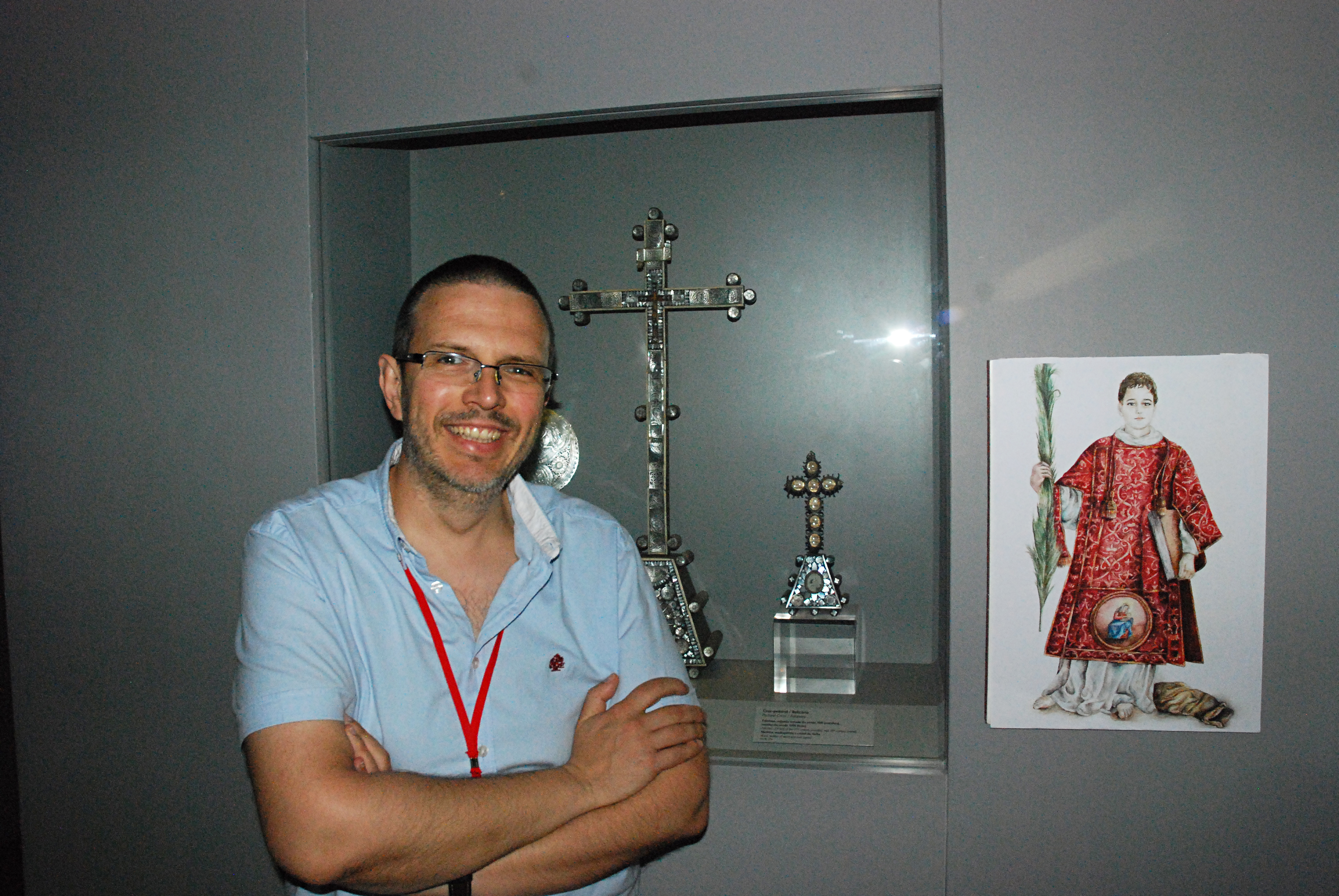 Lisbona (Portogallo), Museu de São Roque, il dott. João Miguel Ferreira Antunes Simões, storico dell'arte, accanto all'icona "Caesarius Diaconus" e alla croce-reliquiario pettorale contenente un frammento osseo di San Cesario diacono e martire. (Museu de São Roque de Lisboa, relicário de São Cesário diácono. Na foto, João Miguel Ferreira Antunes Simões, Historiador de Arte).